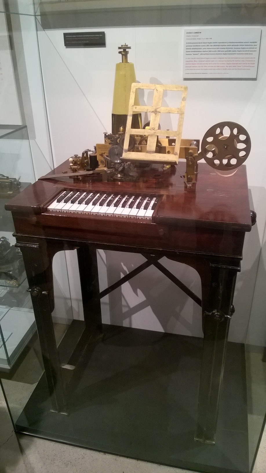 Hughes-lennätin on lainattu Rupriikin näyttelyyn Soneran historiallisista kokoelmista.